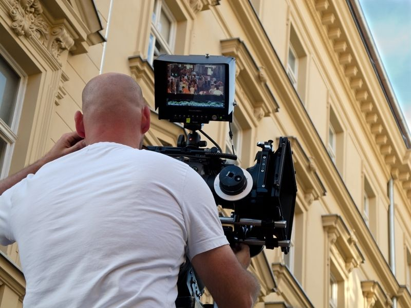 Zagreb